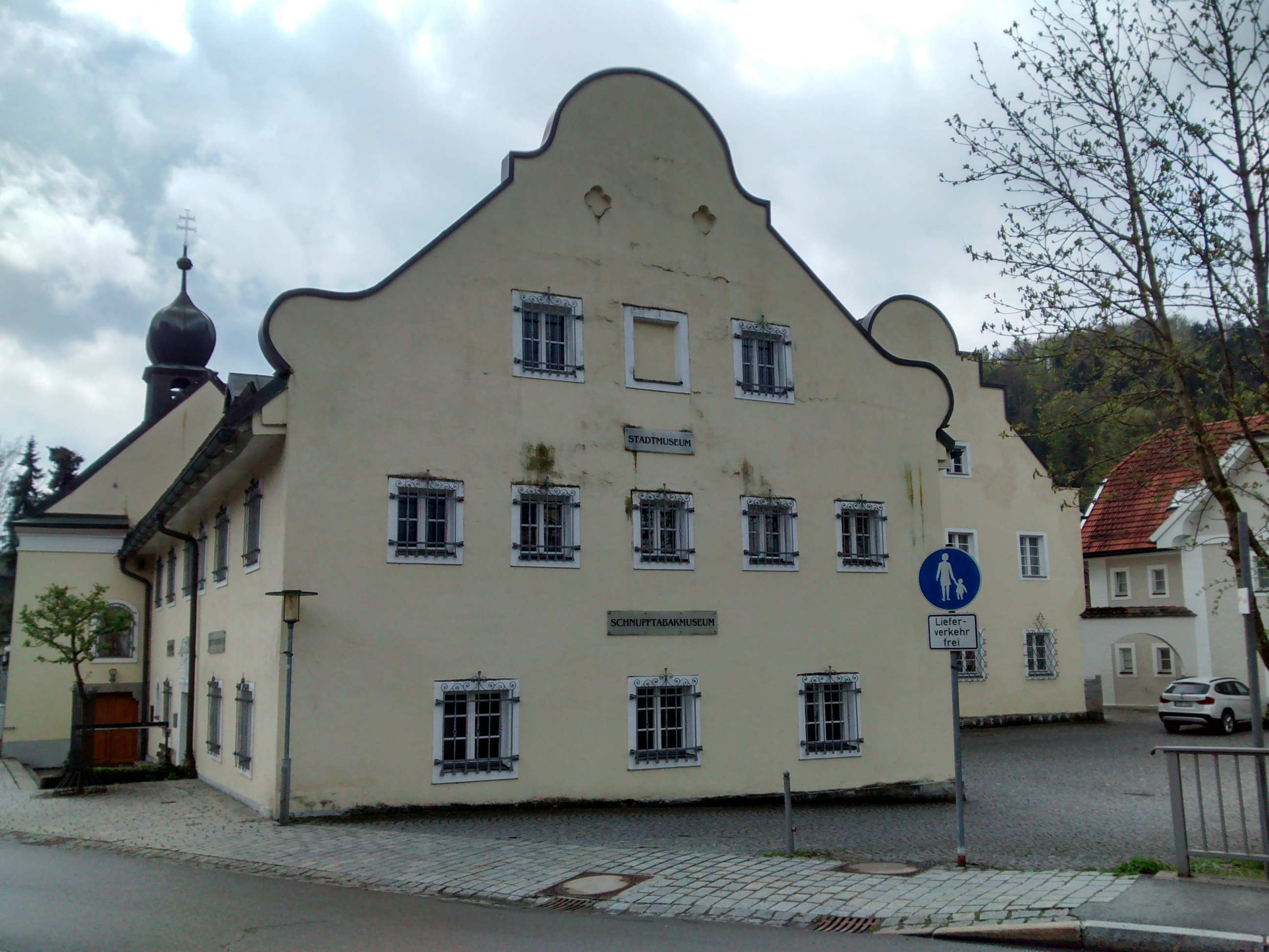 Stadtmuseum Grafenau